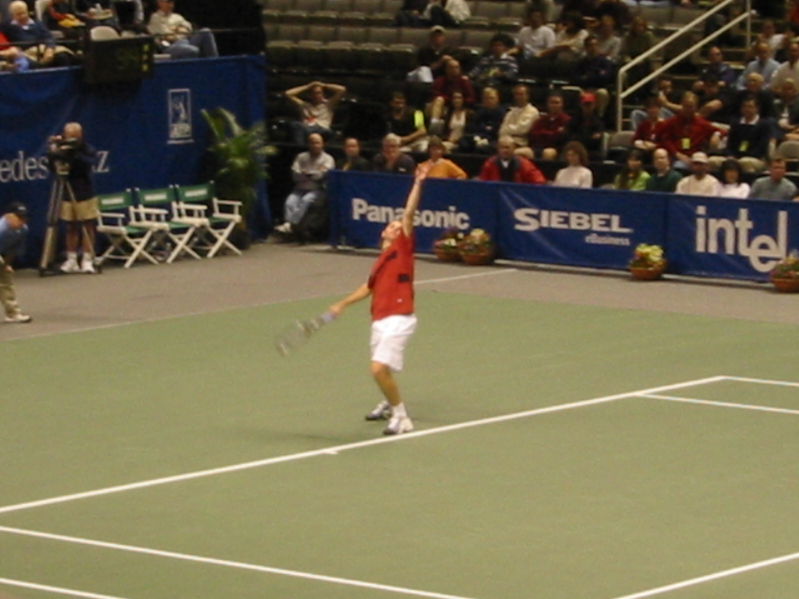 Mardy Fish: Siebel Open 2004